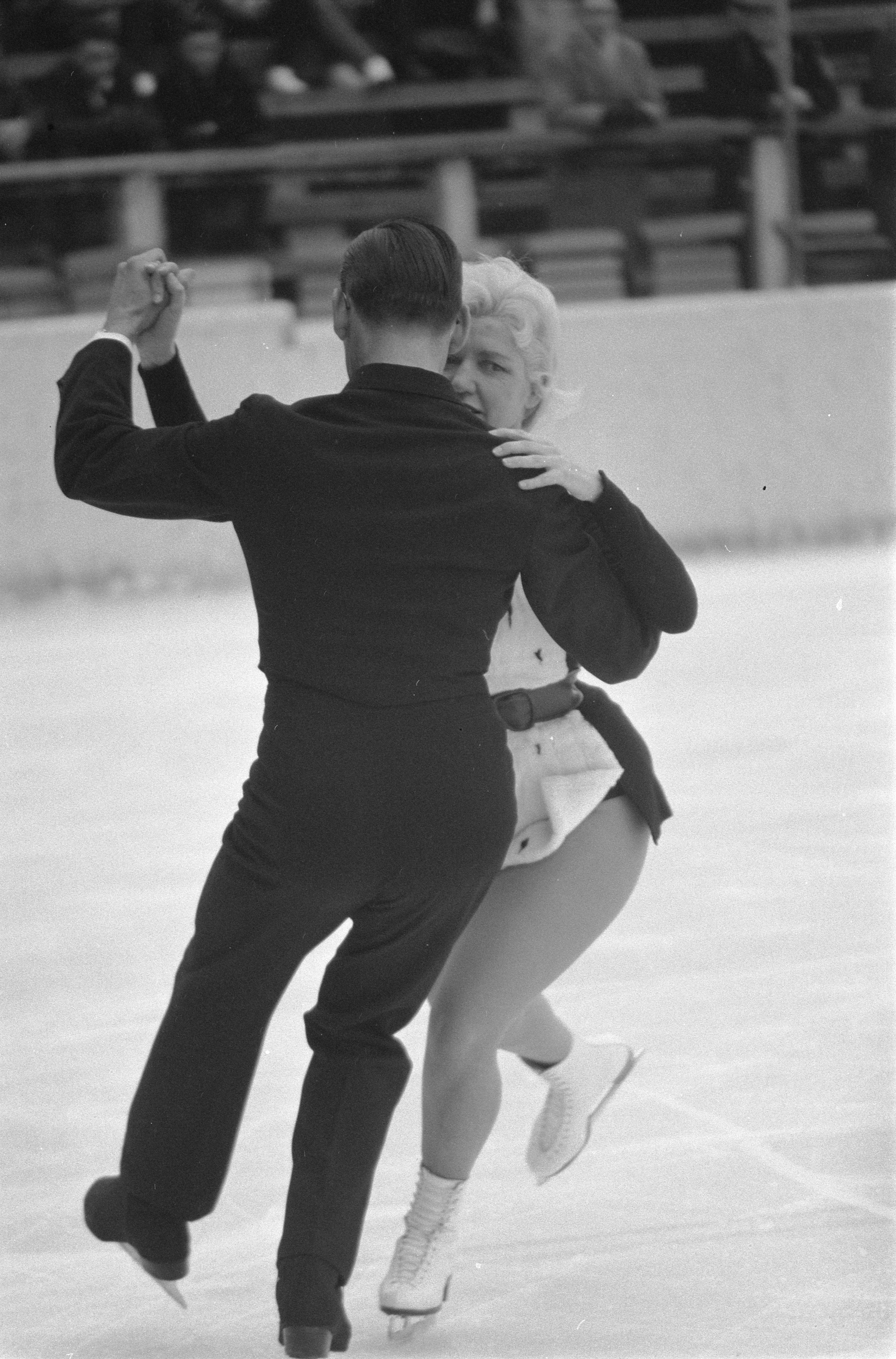 Collectie / Archief : Fotocollectie Anefo Reportage / Serie : [ onbekend ] Beschrijving : Echtpaar Odink tijdens ijsdansen in Garmisch Datum : 5 februari 1960 Locatie : Garmisch Trefwoorden : IJSDANSEN, echtparen Persoonsnaam : Odink Fotograaf : Pot, Harry / Anefo Auteursrechthebbende : Nationaal Archief Materiaalsoort : Negatief (zwart/wit) Nummer archiefinventaris : bekijk toegang 2.24.01.05 Bestanddeelnummer : 911-0013